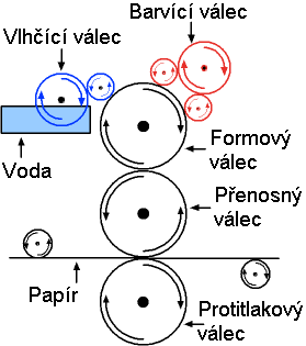 Český popis ofsetového tisku